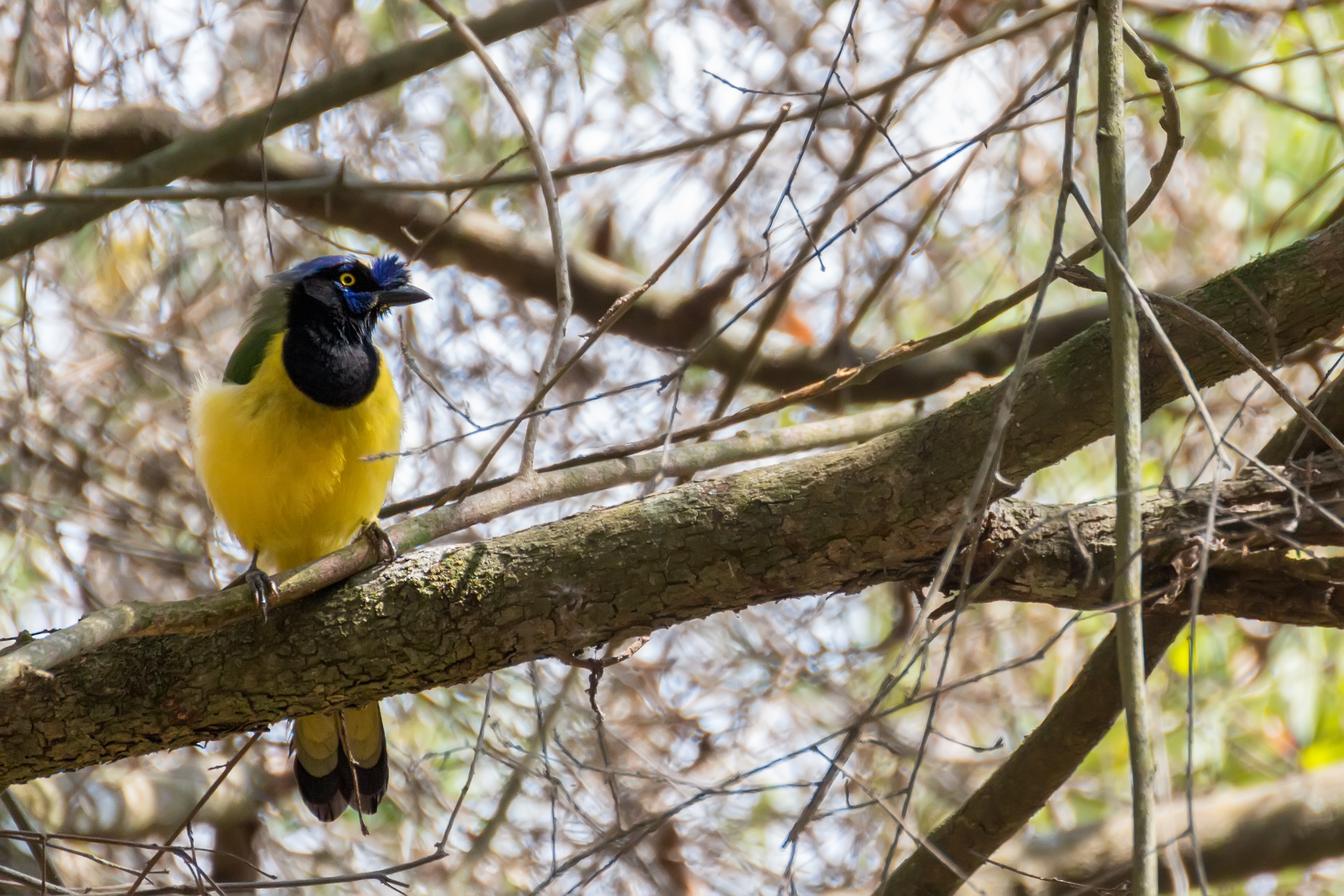 Inca Jay | Querrequerre (Cyanocorax yncas)